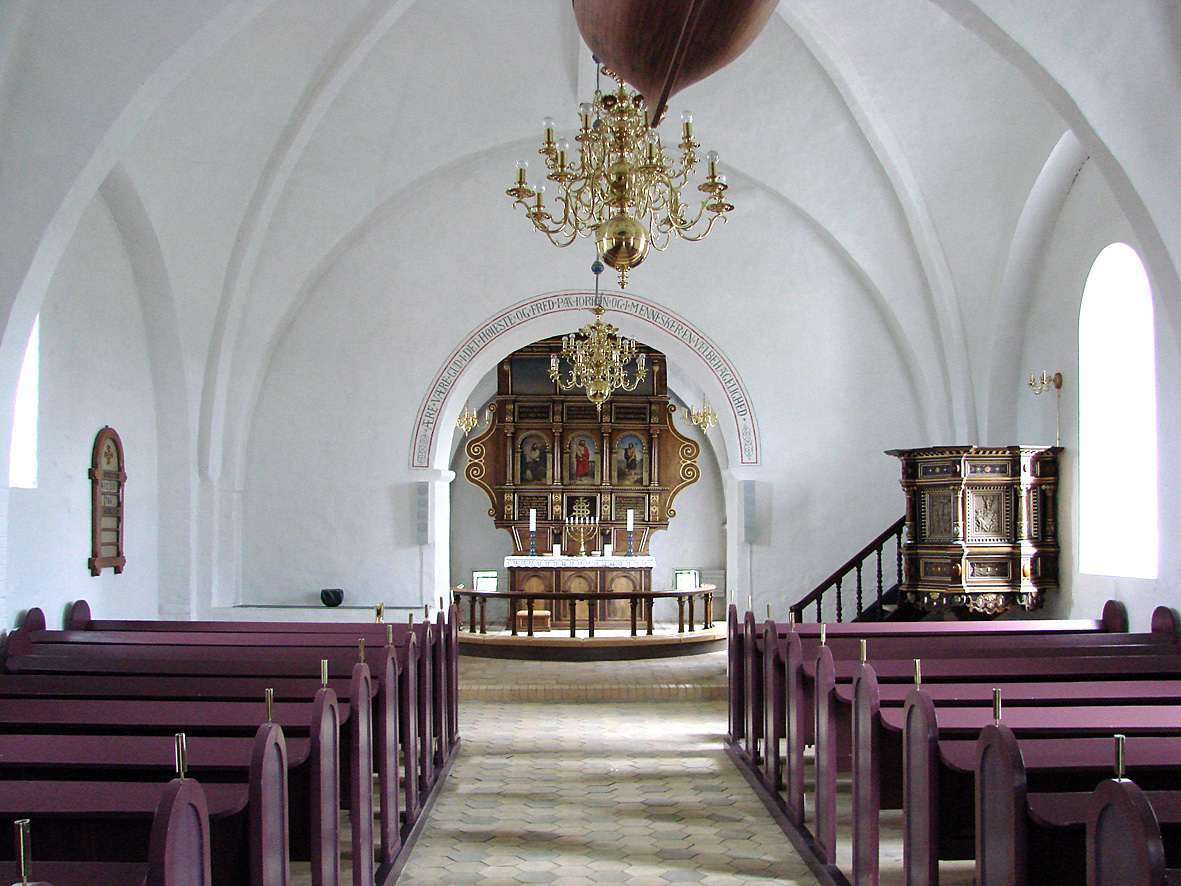 Kirkerummet i Haldum Kirke der ligger i Haldum Sogn, Sabro herred. Århus amt, Århus stift, Østjylland, Denmark. Haldum Kirke